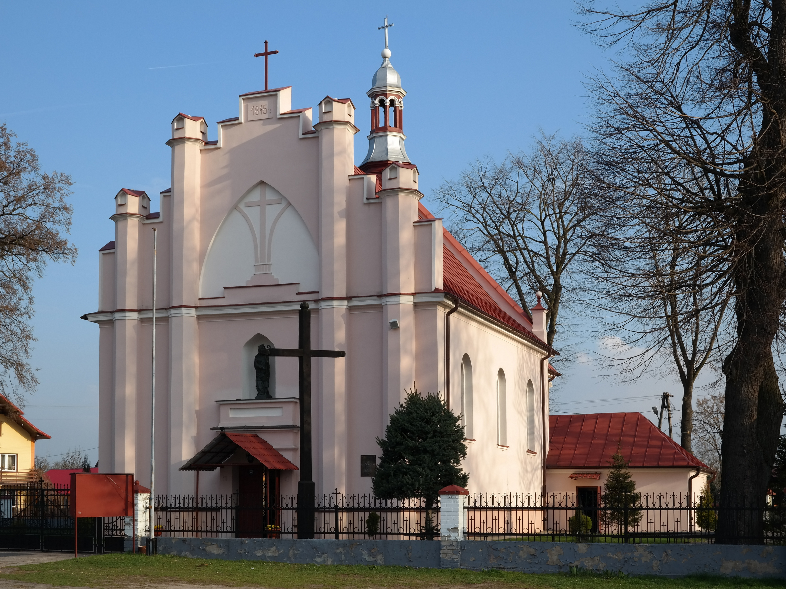 Kościół pw. św. Idziego we wsi Bałdrzychów.